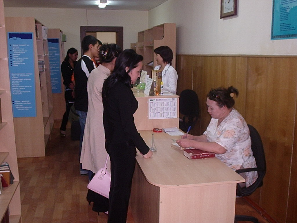 Абонемент